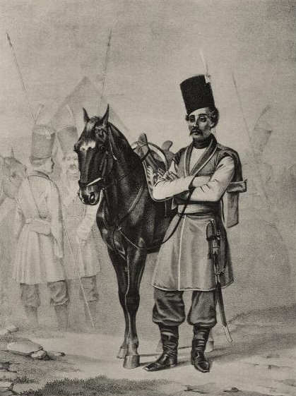 Рядовой Чугуевской Конвойной Казачьей Команды, с 1776 по 1790 г. (В вседневной форме).